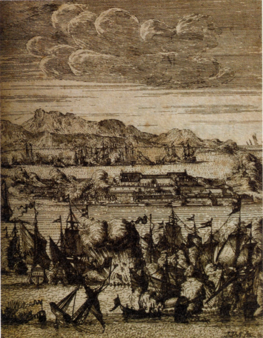 《被遺誤的福爾摩沙》海戰圖。Bân-lâm-gú: Pī uî-gōo ê formosa hái-tsiàn-tôo.